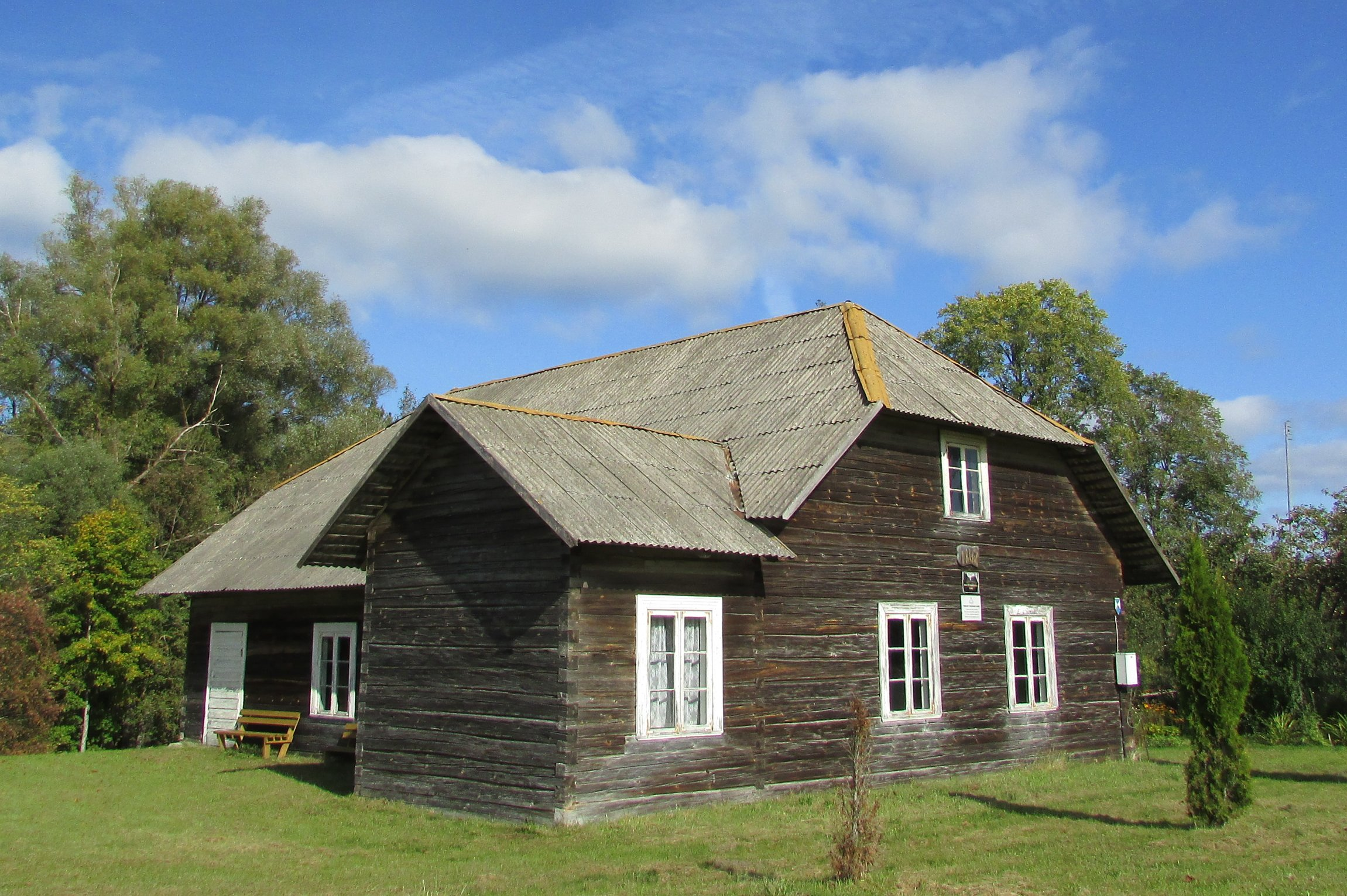 " Mikužu " saiešanas nams, Trapenes pagasts. Celts 1803. gadā Brāļu draudžu vajadzībām, no 19.gs. vidus izmantots kā luterāņu draudzes lūgšanu nams.